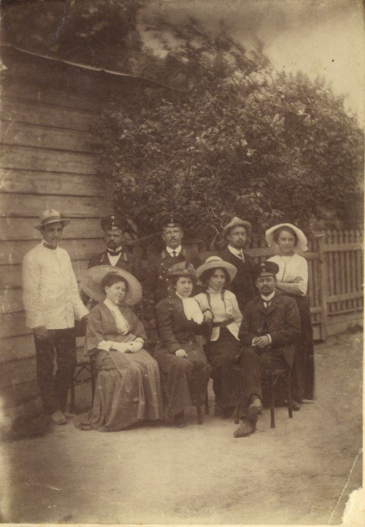 Группа камышловских гимназических преподавателей, 1911 (или 1912) г. Крайний слева, рядом с математиком Макаричевой Ольгой Степановной, стоит Виктор Генадиевич Носилов, погибший в первой мировой. Крайняя справа, рядом с художником И.Д. Самгиным, стоит Зинаида Генадиевна Носилова.